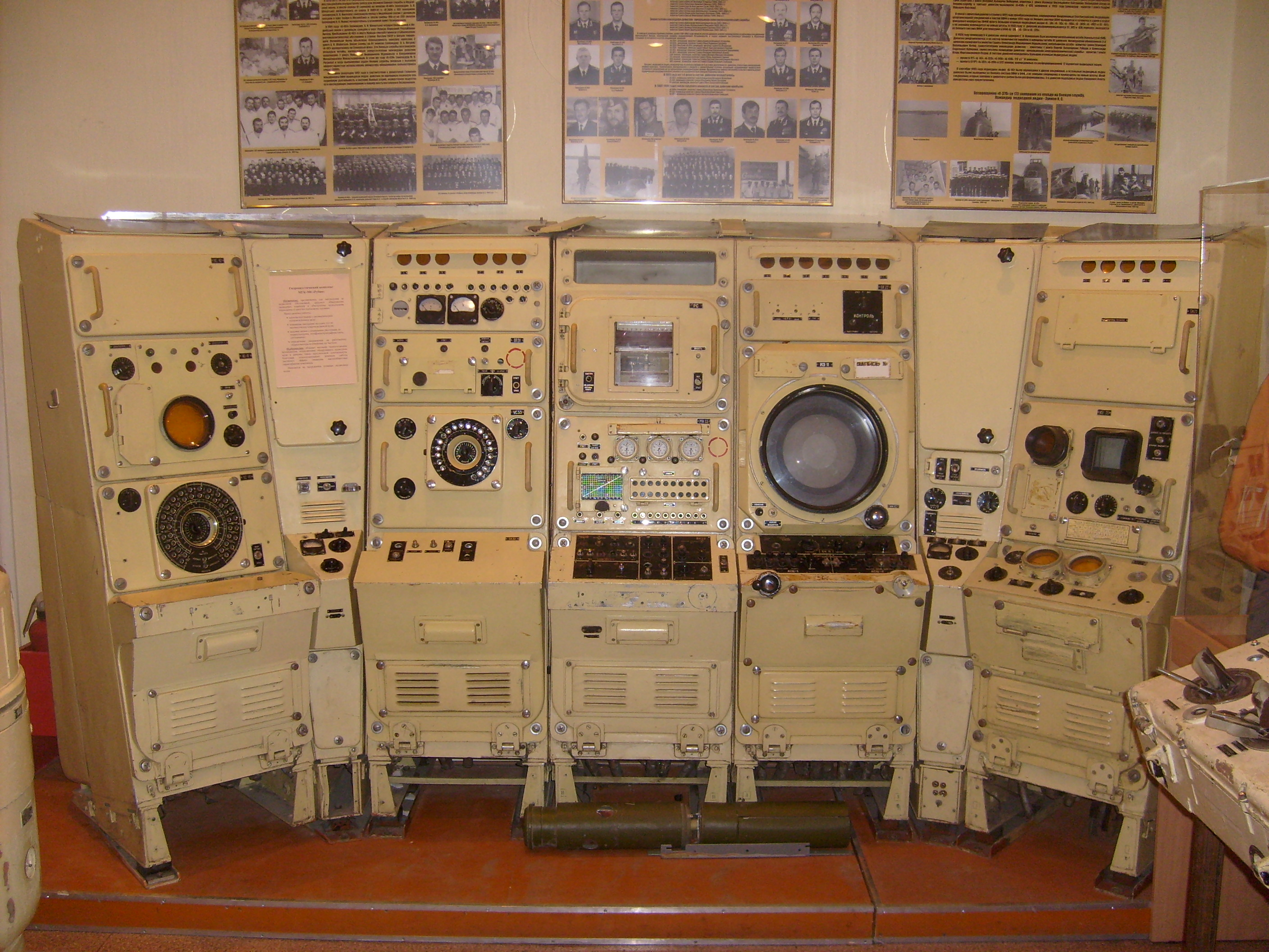 Гидроакустический комплекс "Рубин"